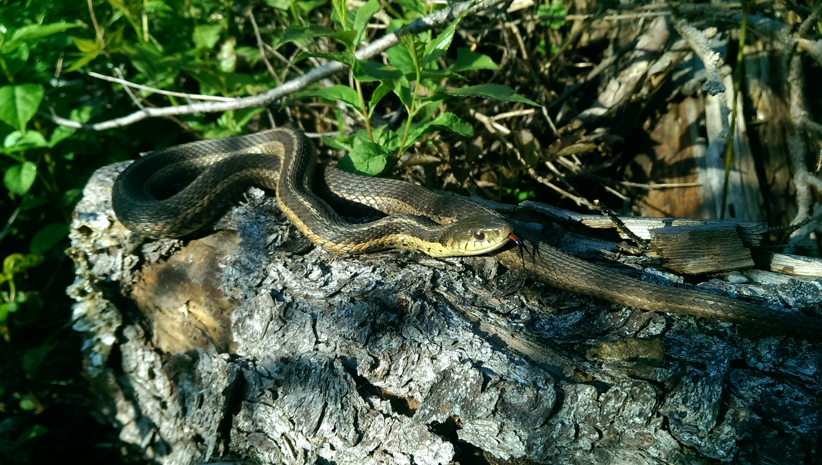 Couleuvre Rayée du Québec: photo prise le matin, au nord du Lac-St-Jean, municipalité de St-Ludger-de-Milot